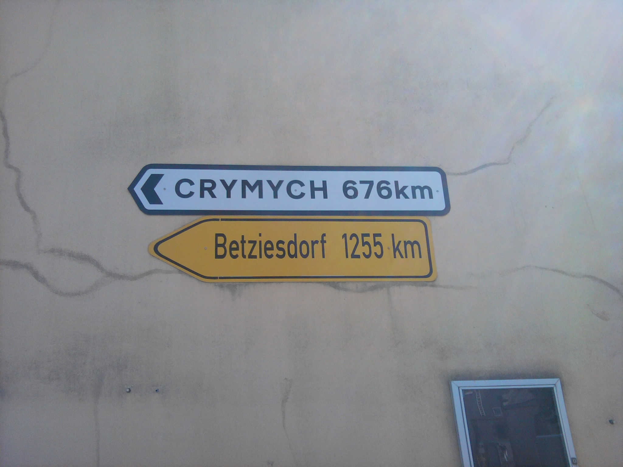 Les jumelages de Plomelin, France